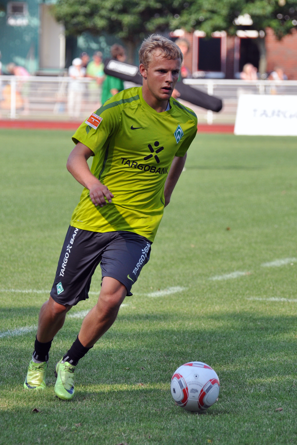 Lennart Thy